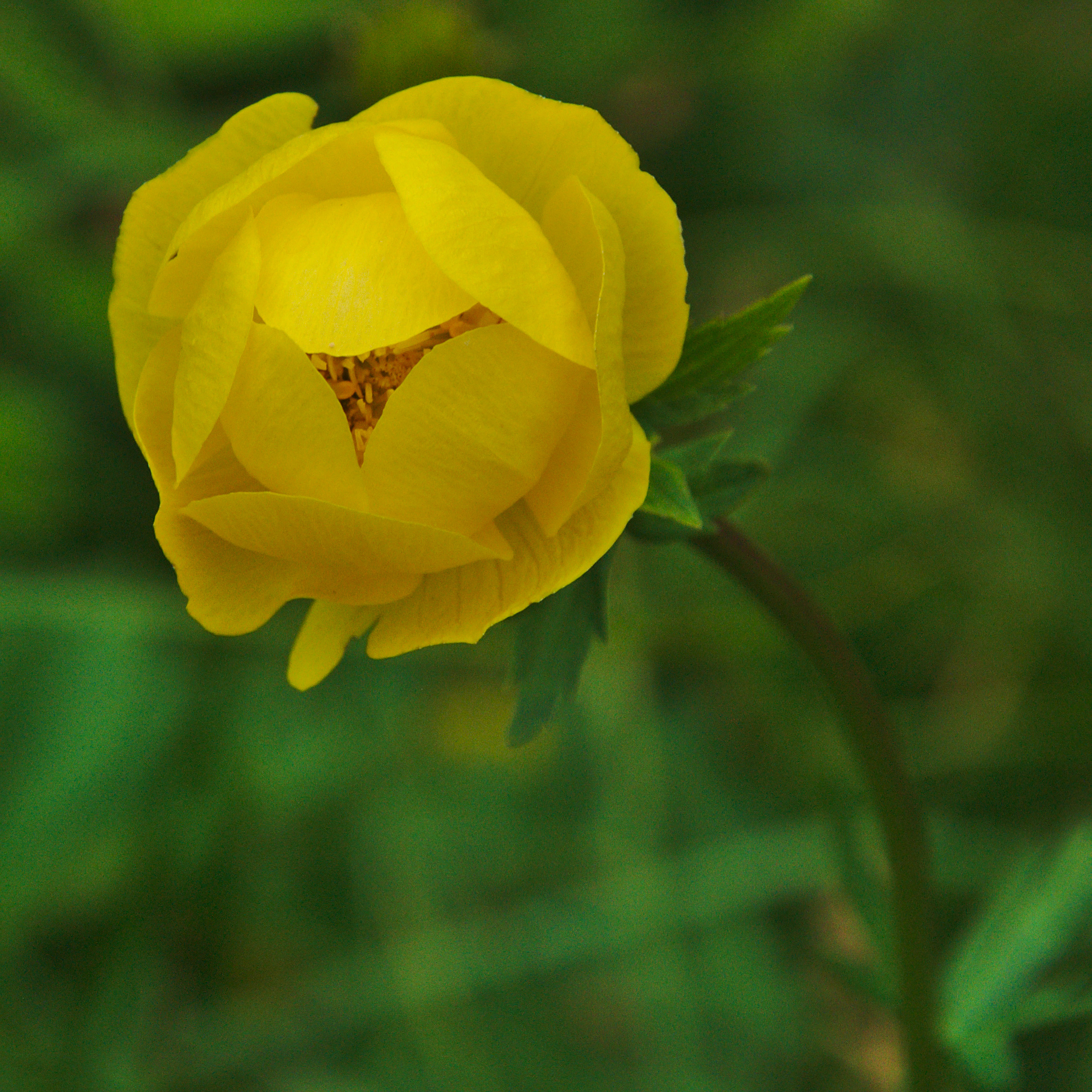 Přírodní rezervace Lipovské úpolínové louky, okres Prostějov